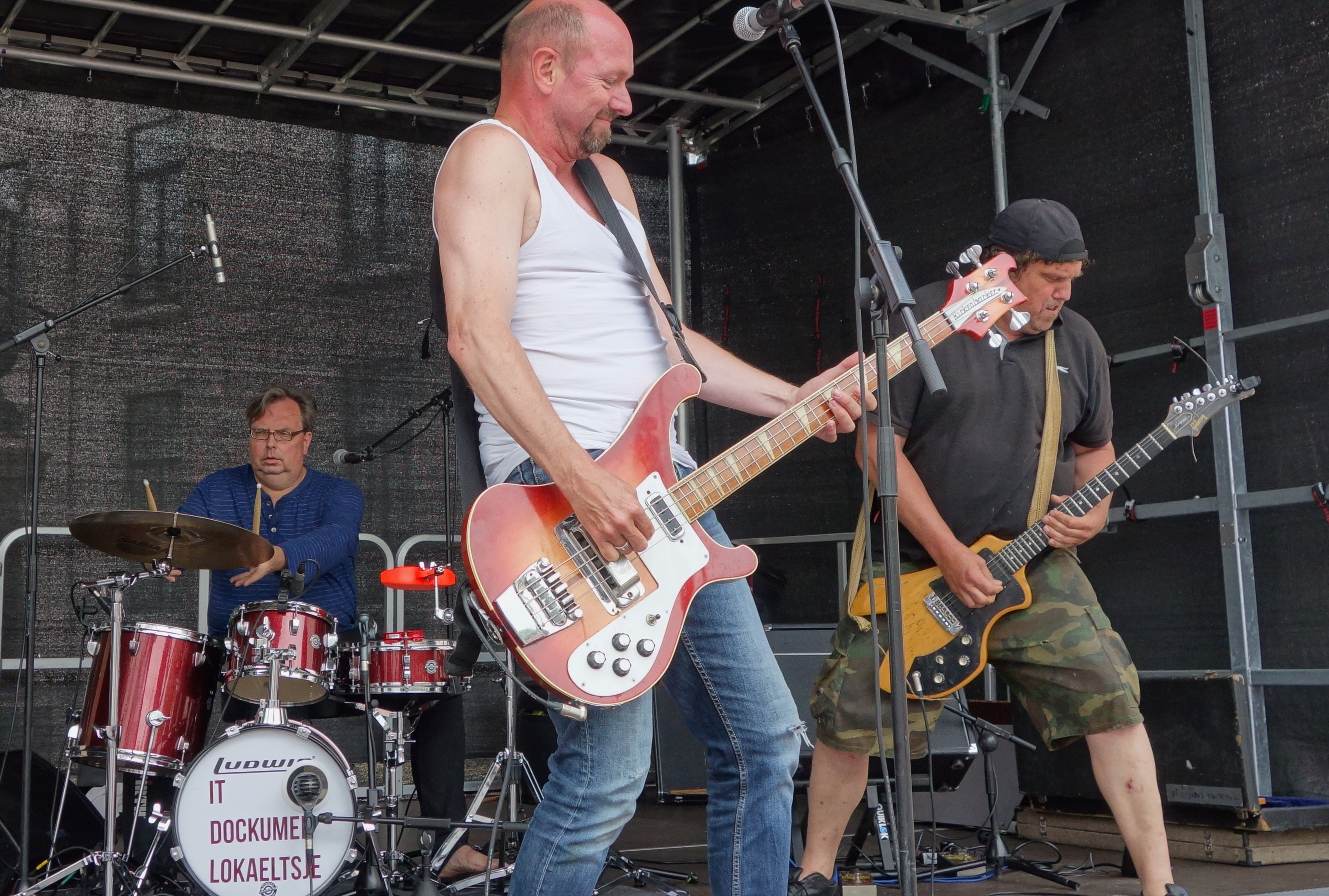 Culture hoofdstad Leeuwarden 2018 (foto Arnold Bartels)